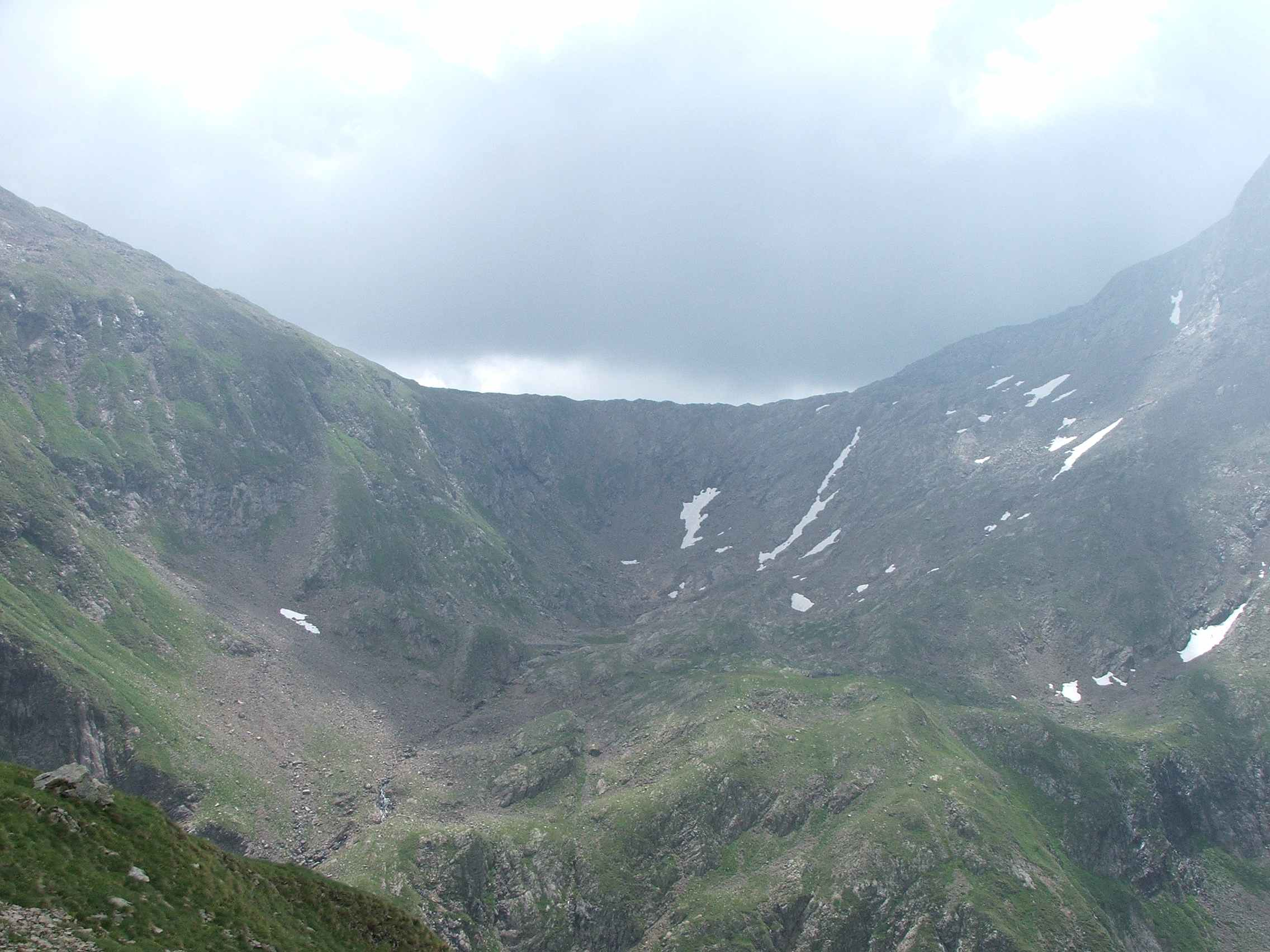 Foto del Passo di Pila, di Orobicon